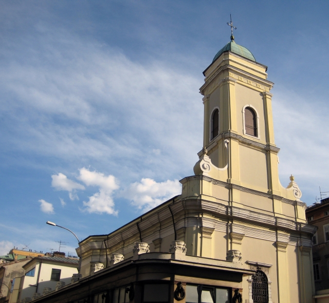 Pravoslavna crkva Svetog Nikole, Rijeka.